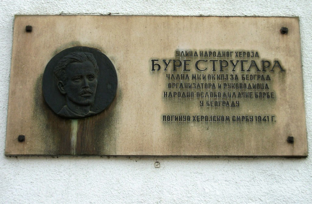 Ulica (bivša) Đure Strugara danas (1010) Carigradska, Beograd u blizini Bajlonijeve pijace. Slikao Goldfinger LICENCA